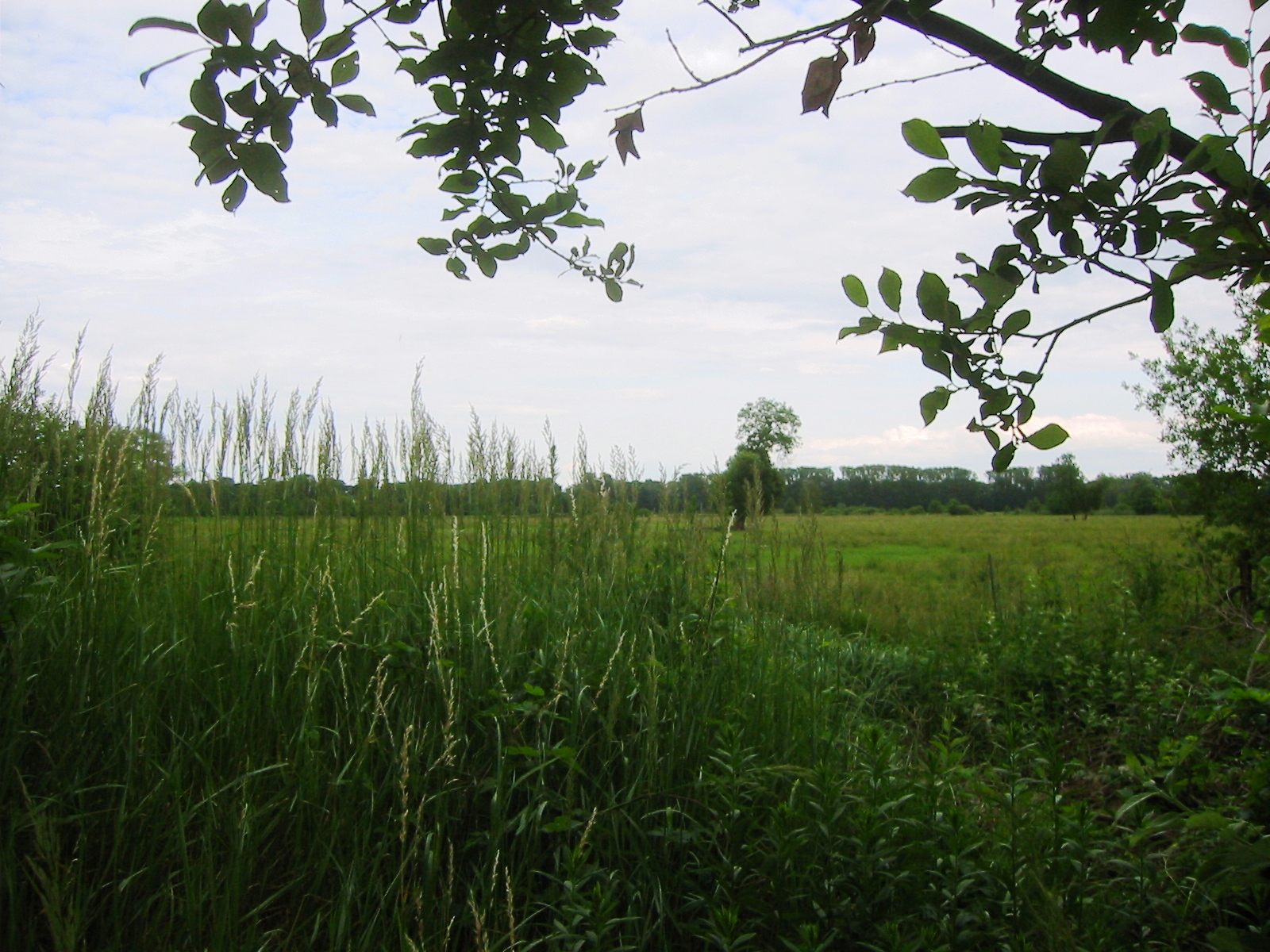 Blick auf das Naturschutzgebiet Gosener Wiesen von der Fischerei Löcknitz aus (Berlin-Müggelheim)